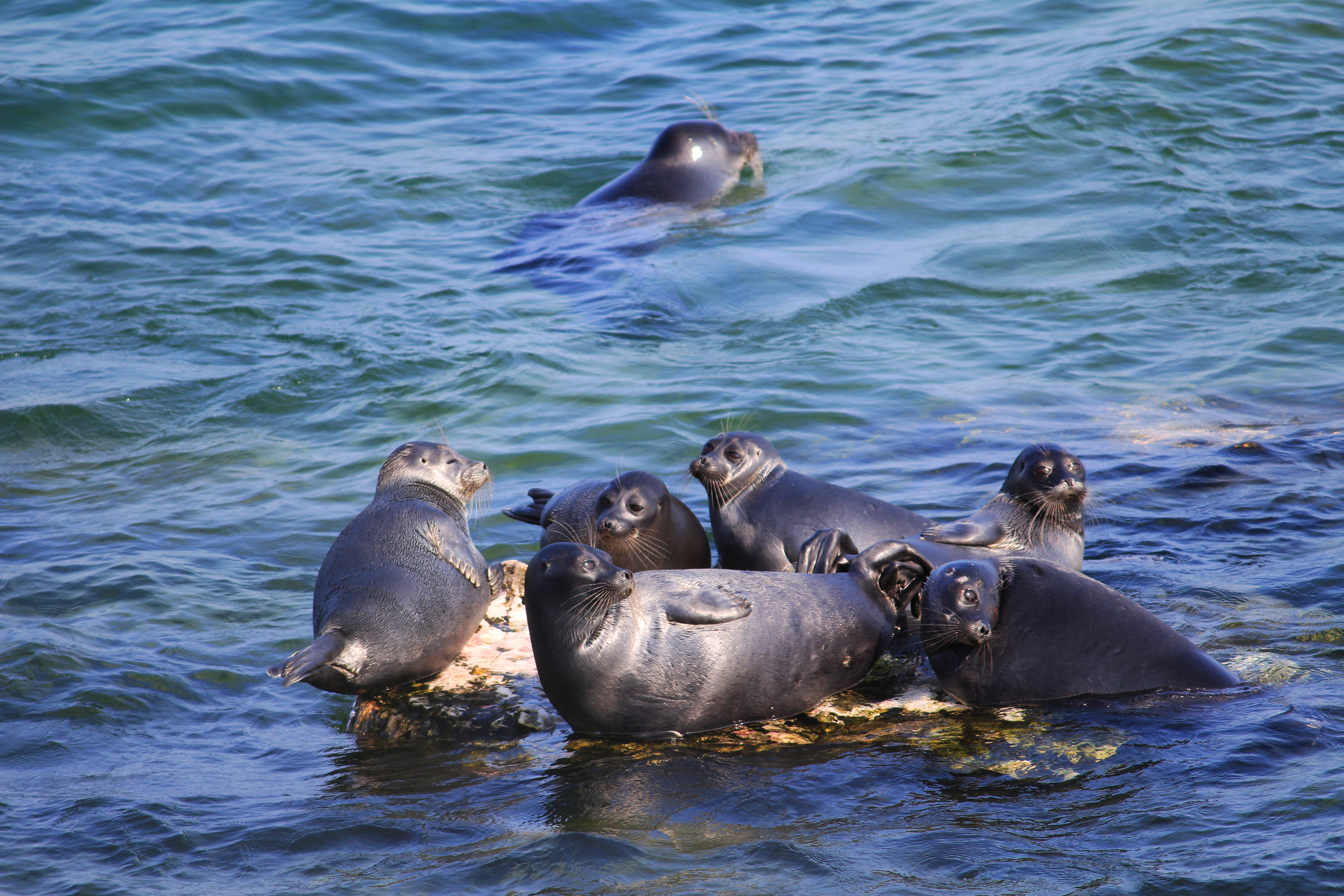 Ушканьи острова: Баргузинский район, Бурятия This image is related to the protected area of Russia number 0310010